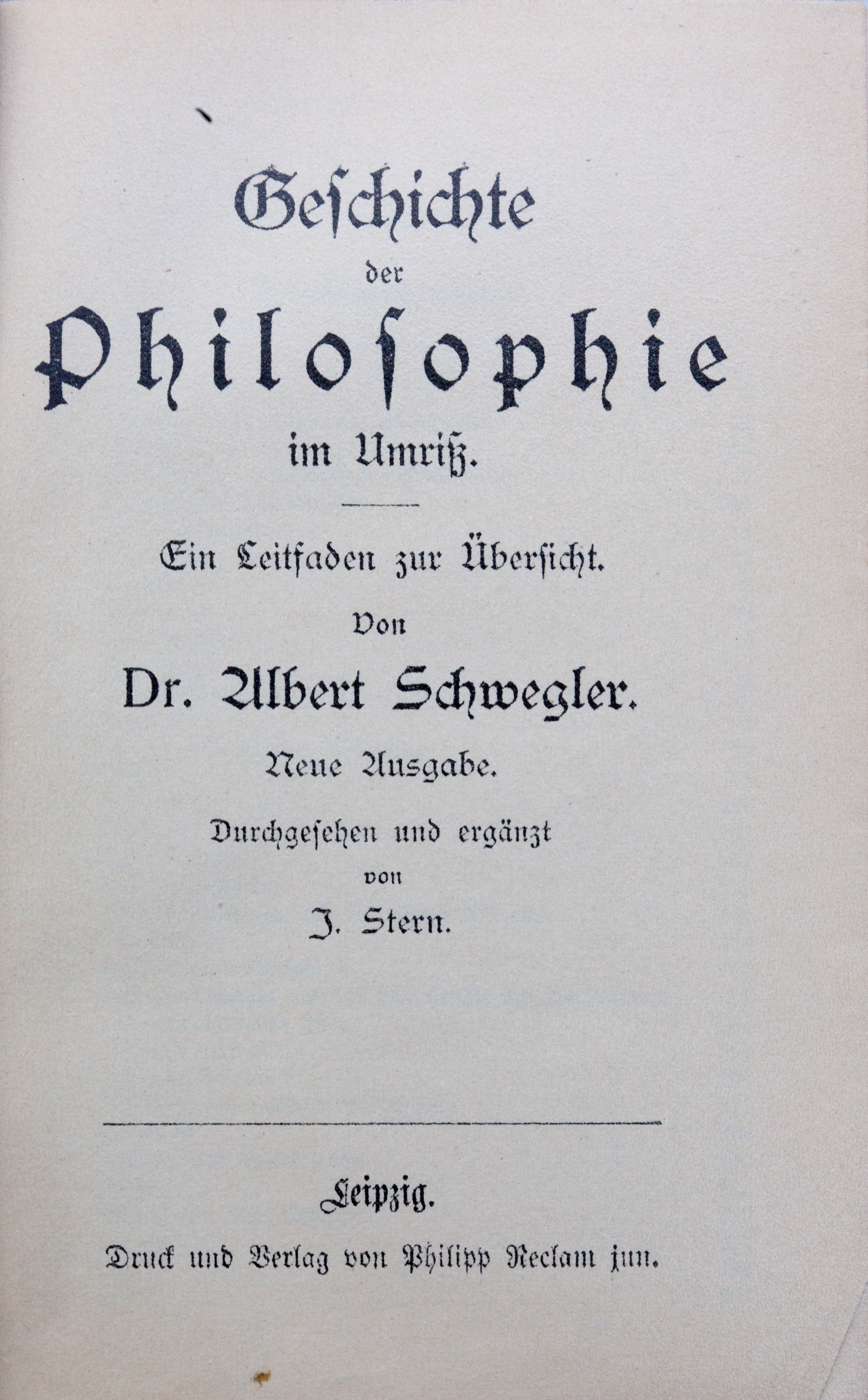 Buch: Geschichte der Philosophie im Umriß. Ein Leitfaden zur Übersicht. Neue Ausgabe, durchgesehen und ergänzt von Jakob Stern (Reclams Universal-Bibliothek. Band 2541/2545), Leipzig: Reclam, o. J. [1889].